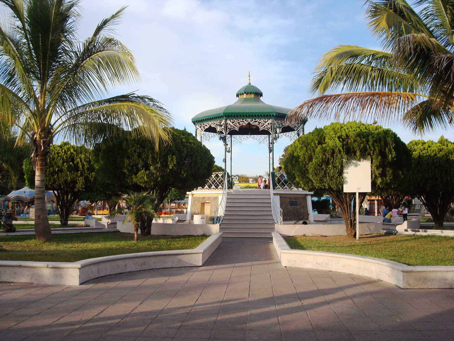 Plaza Principal de San Martin Hidalgo.